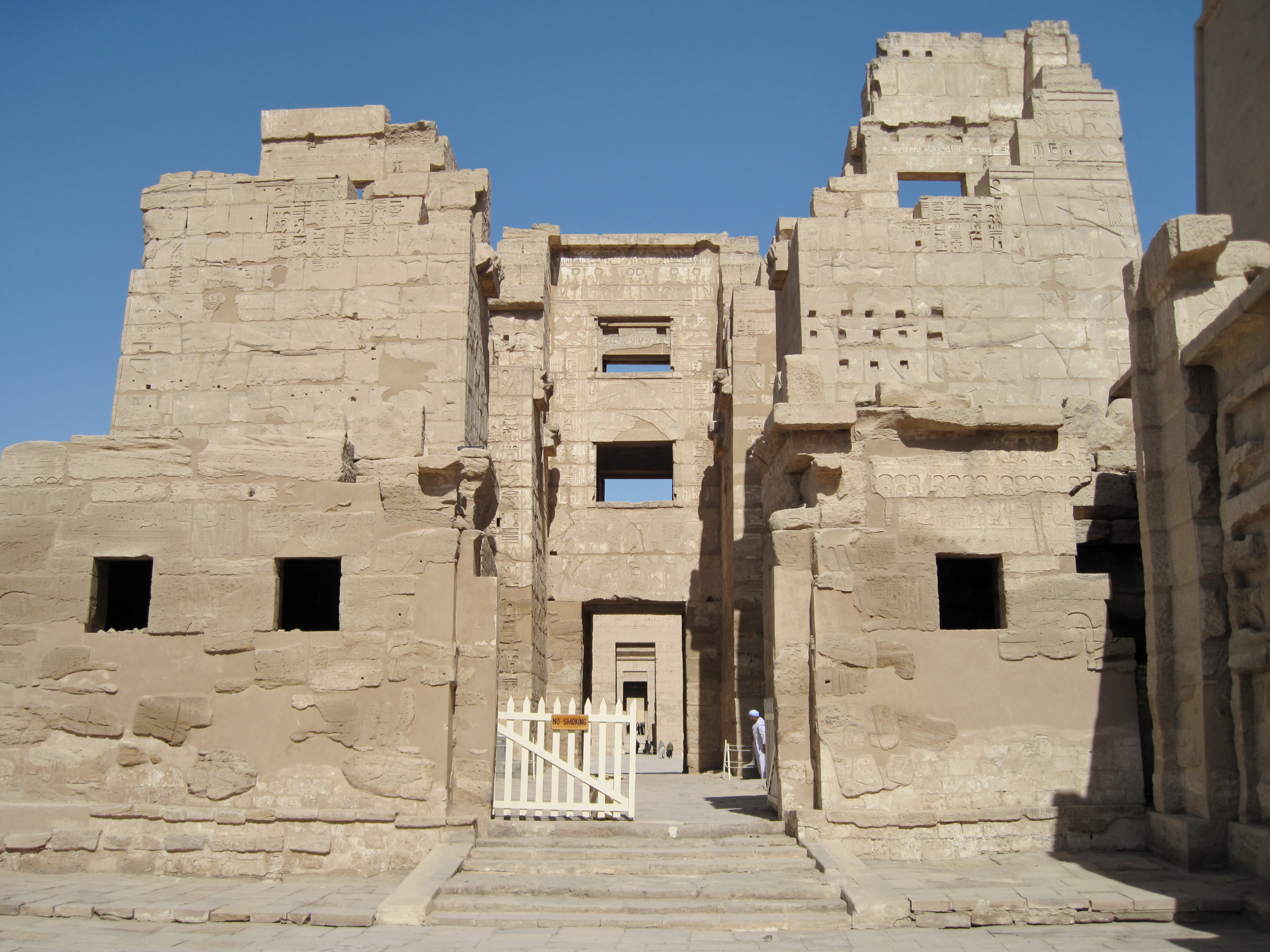 Eingang zum Tempel Ramses’ III. in Medinet Habu, Ägypten